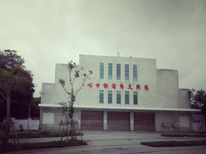 龍岡藝文活動中心